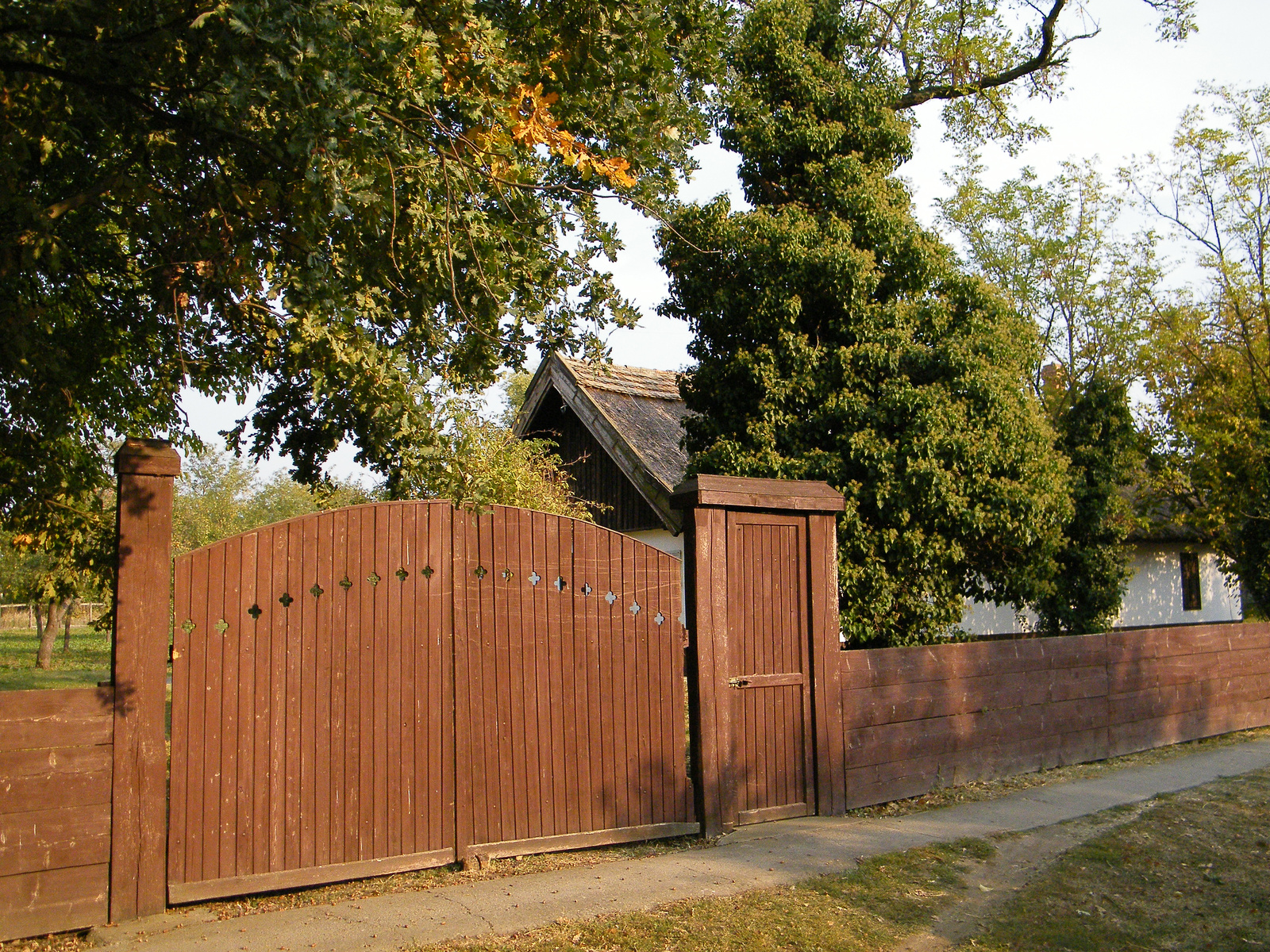 Lakóház, népi (Biharnagybajom, Petőfi utca 4.) This is a photo of a monument in Hungary, Identifier: 5205